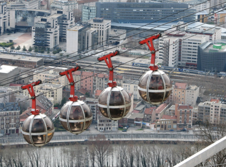 Téléphérique de Grenoble ("les bulles") author : MetallYZA (25/03/2006)